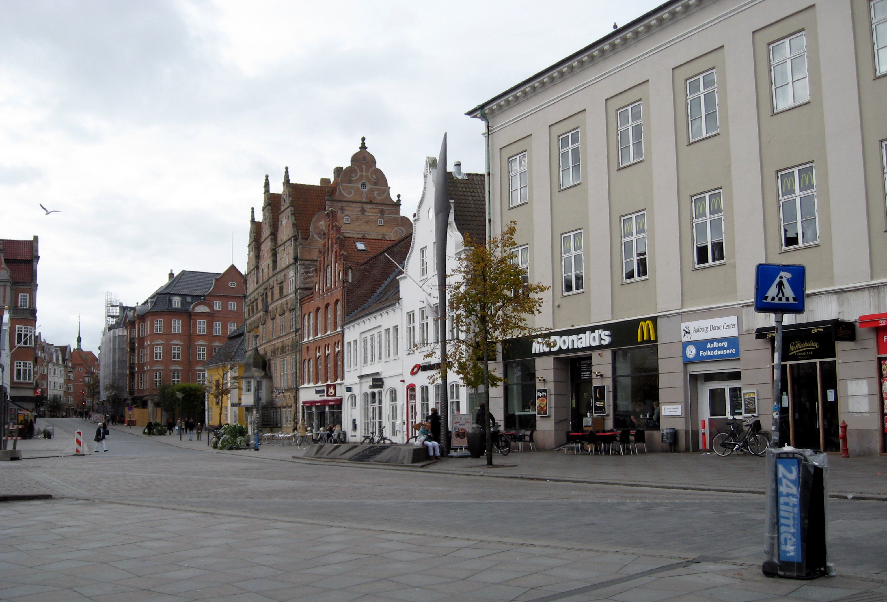 Aalborg, Nytorv